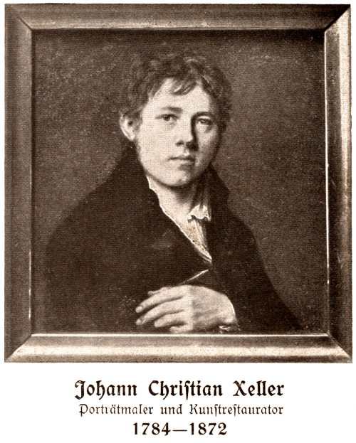 Johann_Christian_Xeller (1784-1872)